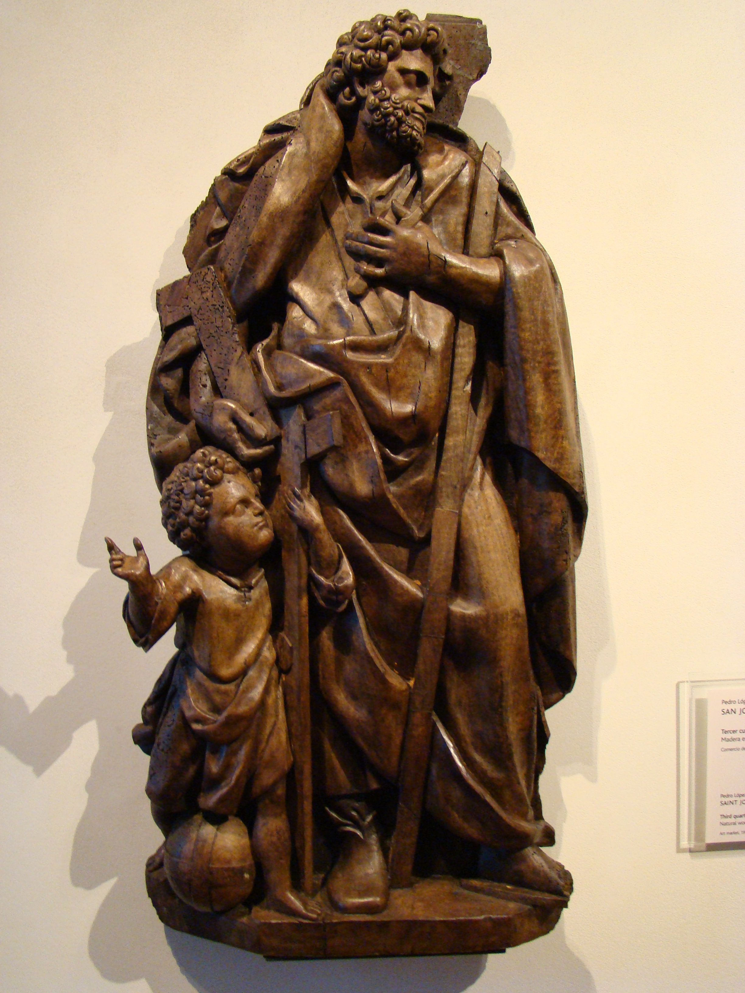 Escultura renacentista en madera sin policromar (tercer cuarto del siglo XVI). Autor: Pedro López de Gámiz (1517-1588). Se expone en el Museo Nacional Colegio de San Gregorio de Valladolid.